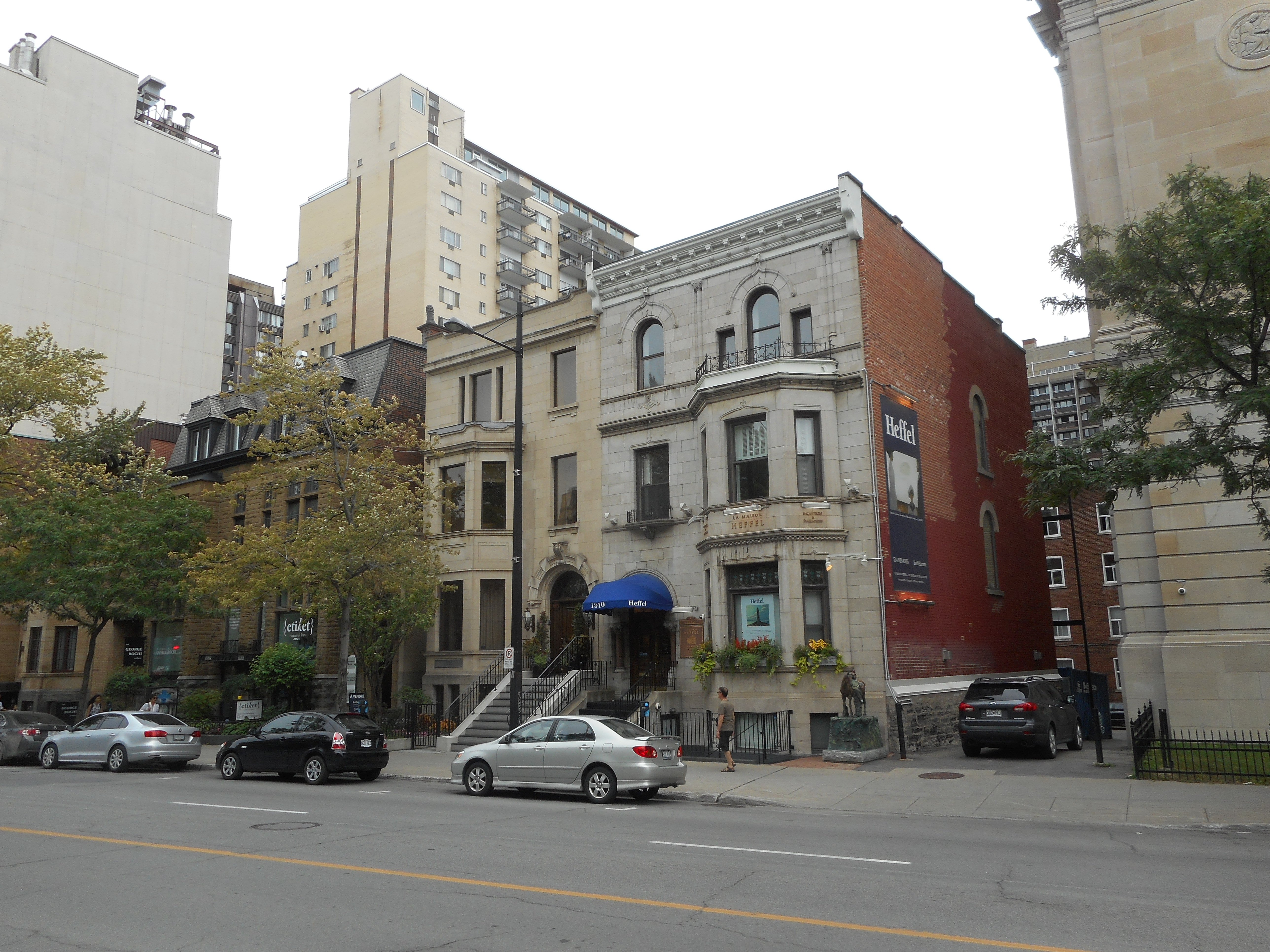 Galerie Heffel Québec Ltée, 1840 rue Sherbrooke Ouest, Montreal, Quebec, Canada, H3H 1E4